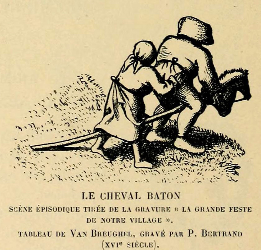 Illustration from Histoire des jouets